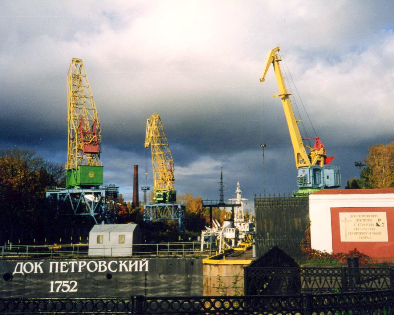 Док Петровский, Кронштадт, Россия (сентябрь 2004).